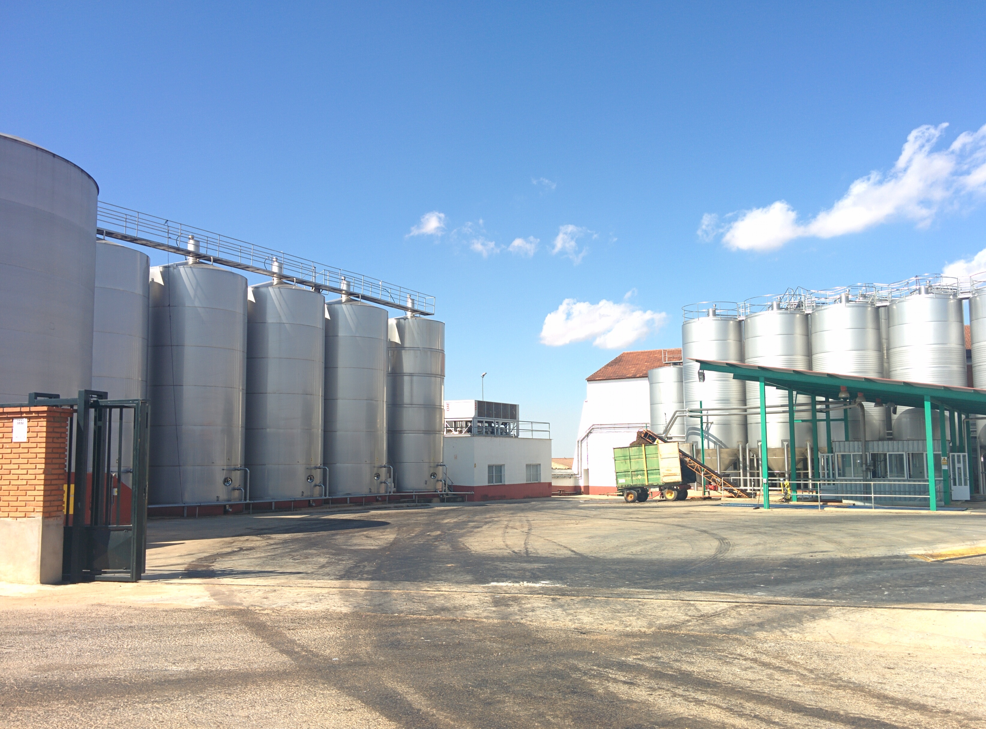 Cooperativa en Casas de Guijarro (Cuenca, España).